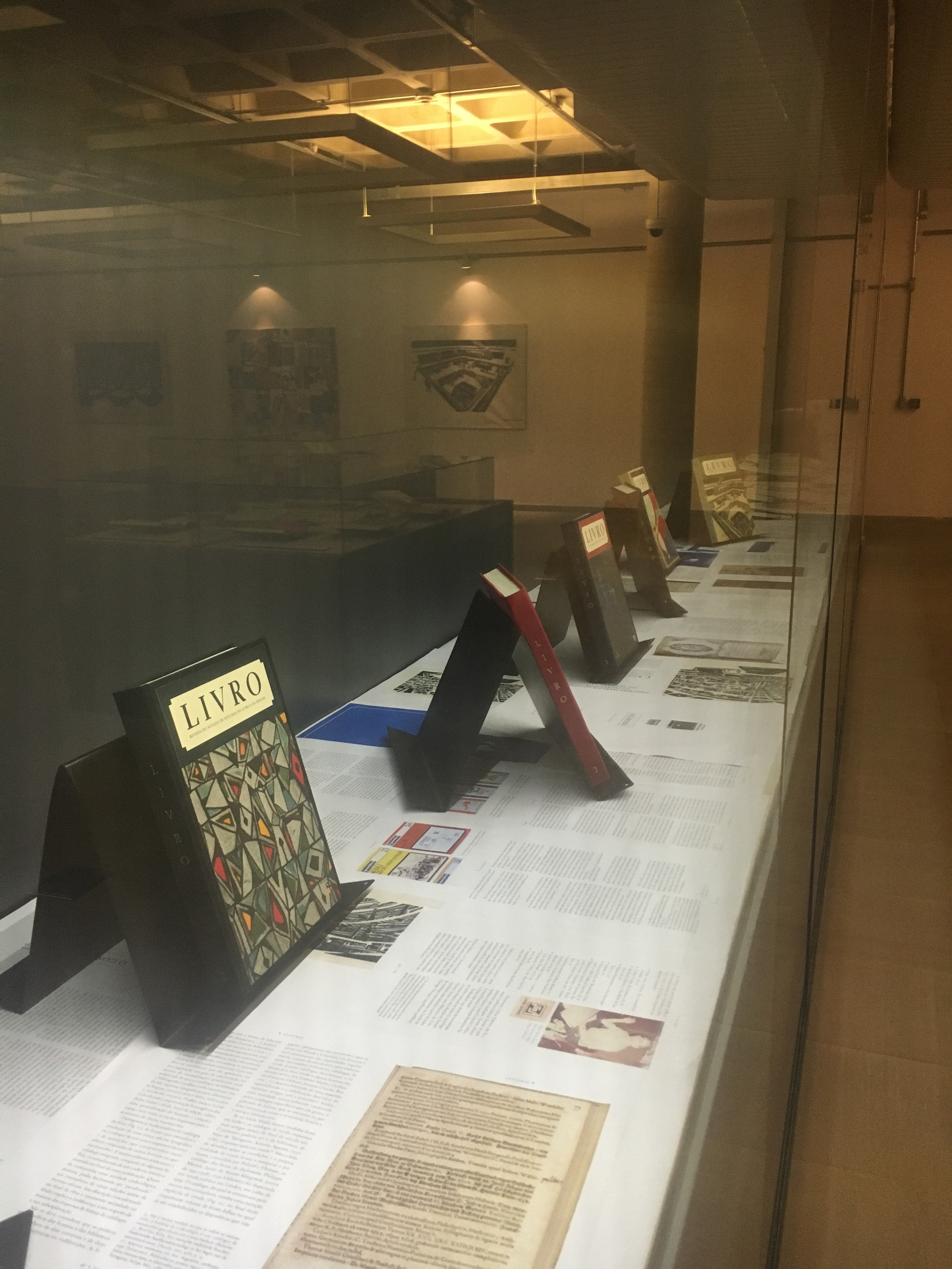 Sala de exposições do andar de baixo.